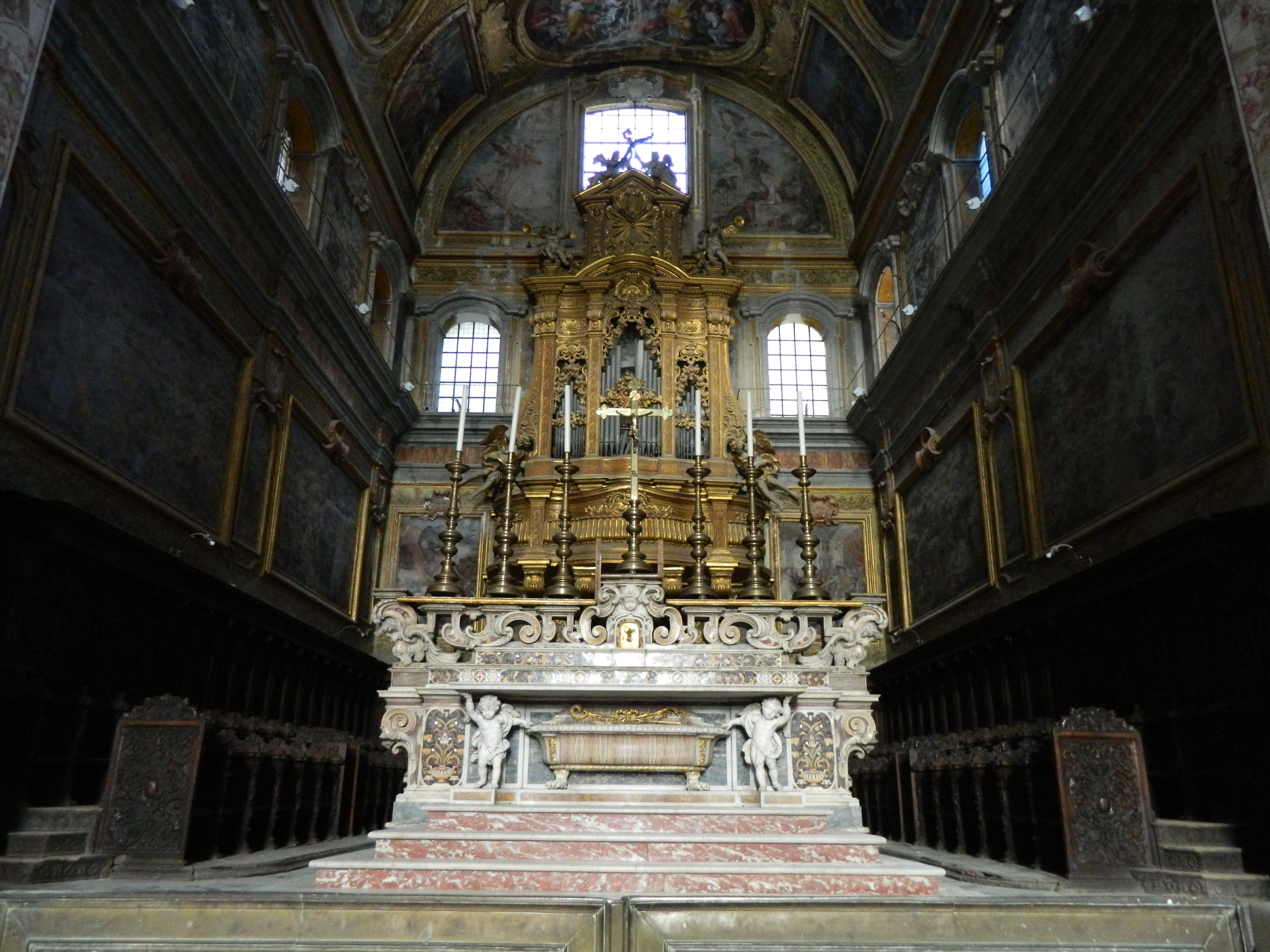 Chiesa dei Santi Severino e Sossio di Napoli - Abside